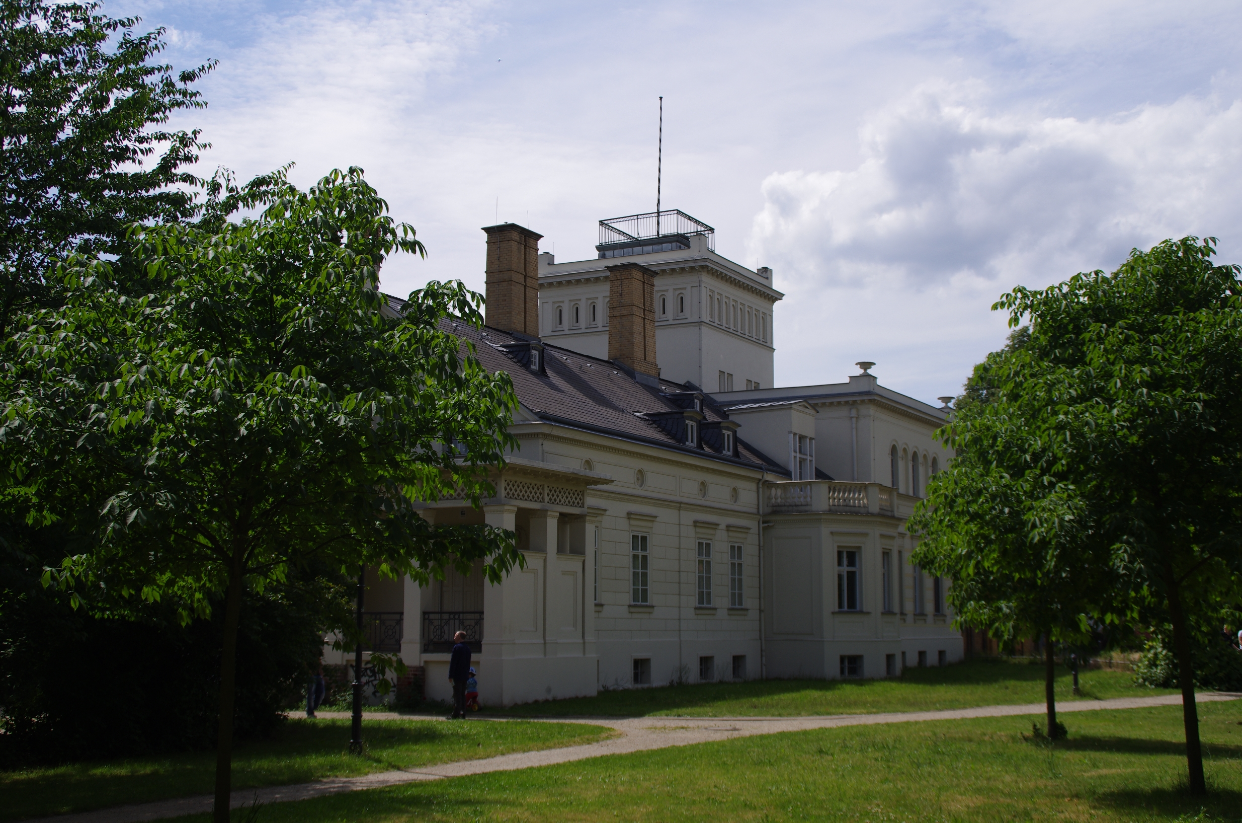 Marienfelde in Berlin. Das Haus Alt-Marienfelde 21 ist Teil des alten Dorfes Marienfelde und steht unter Denkmalschutz.